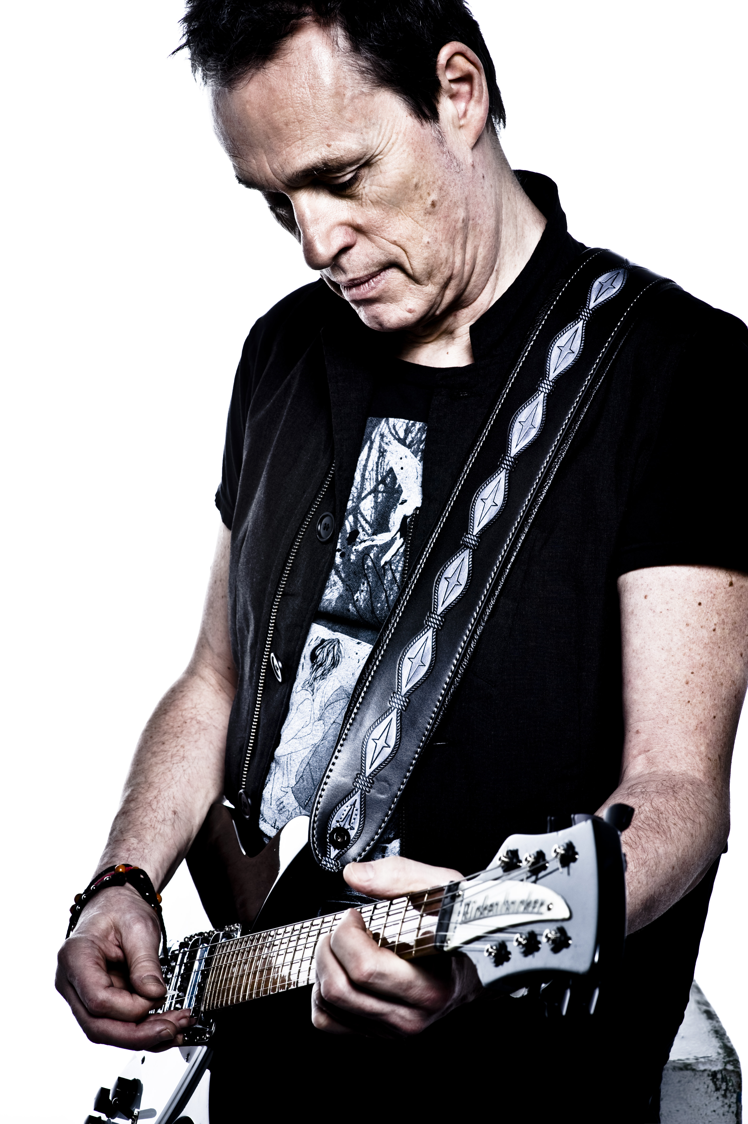 John Porter, sesja do płyty